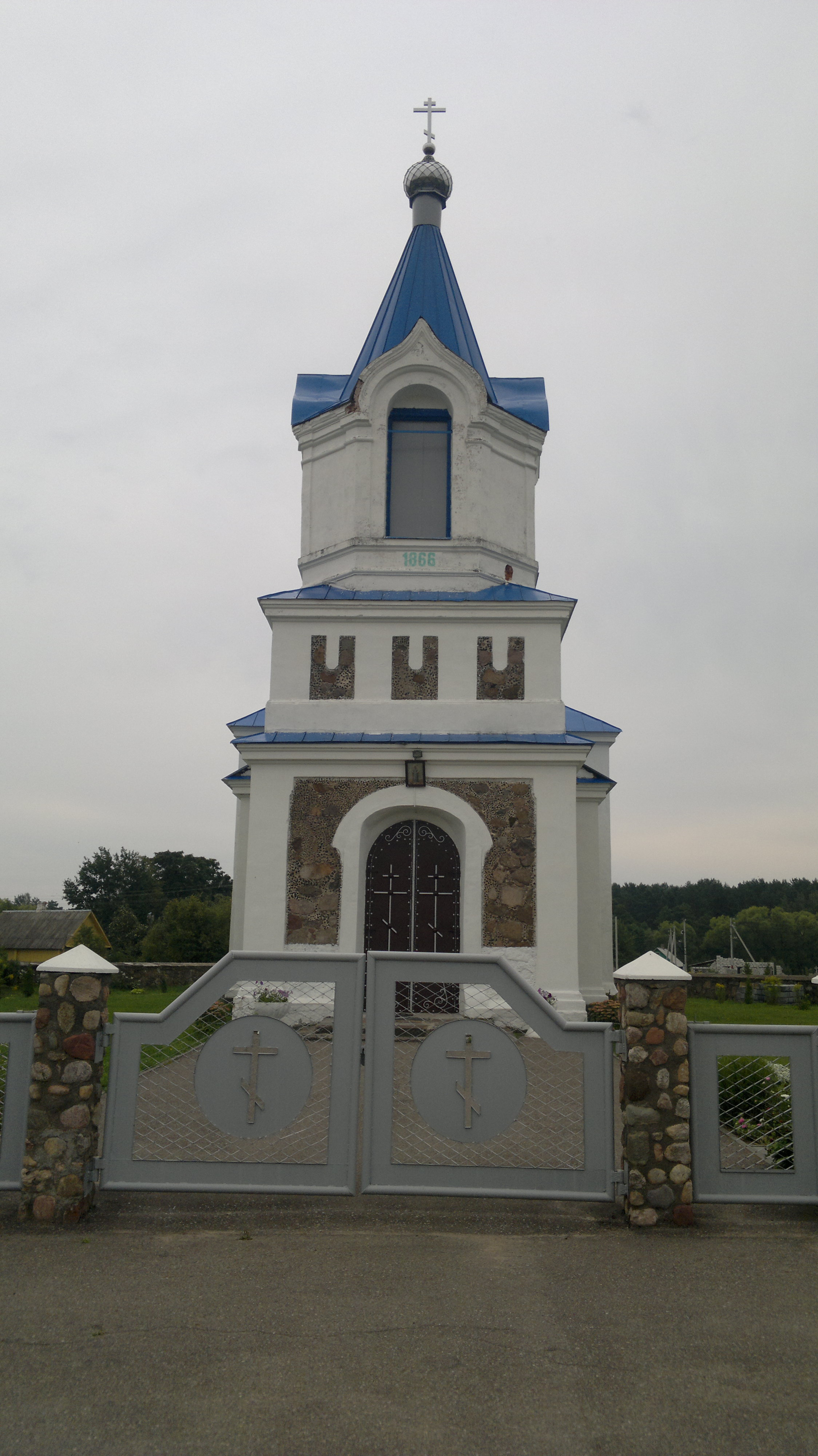 Церковь в Михневичах